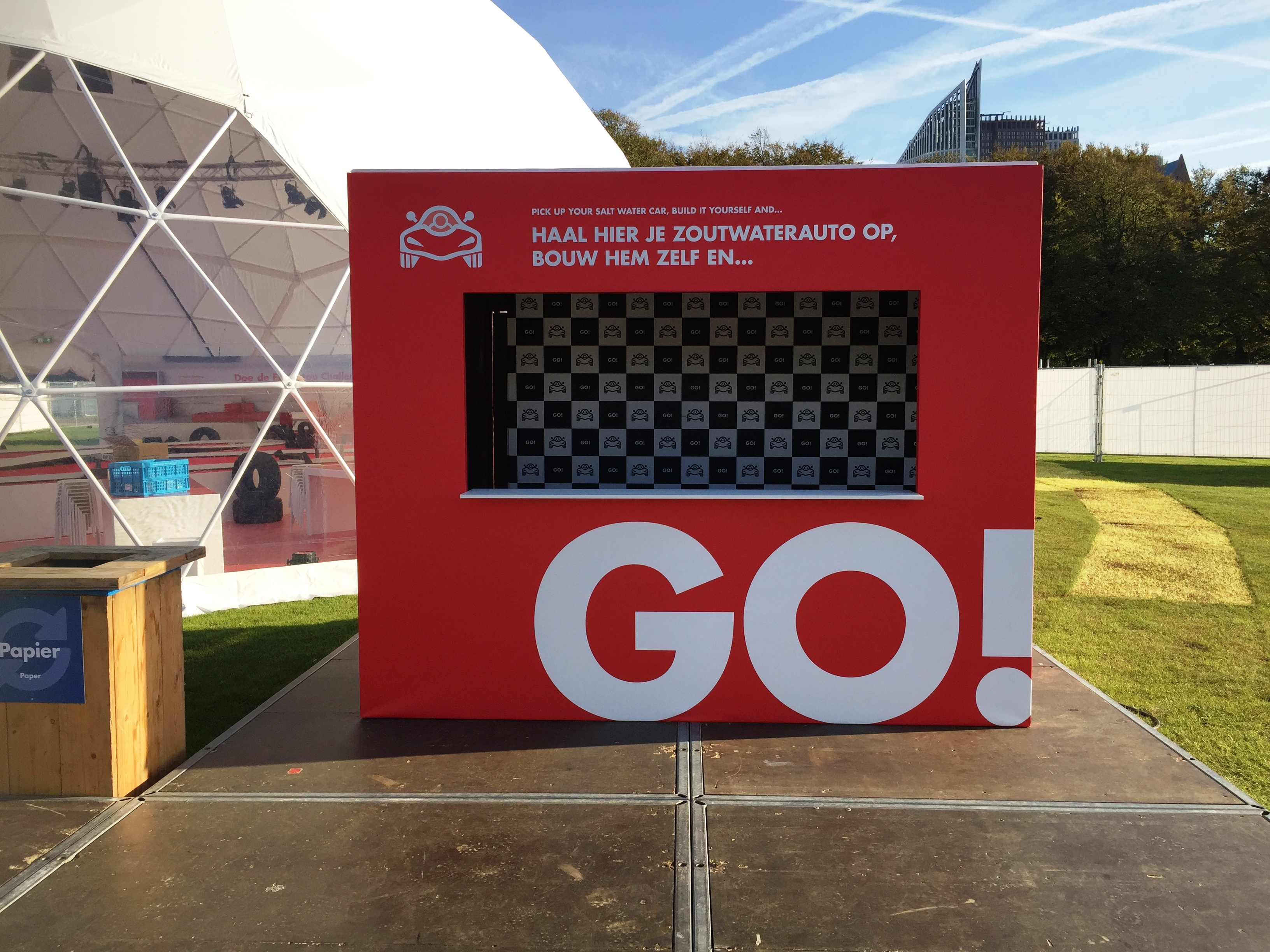 Generation Discover 2018 op het Malieveld in Den Haag